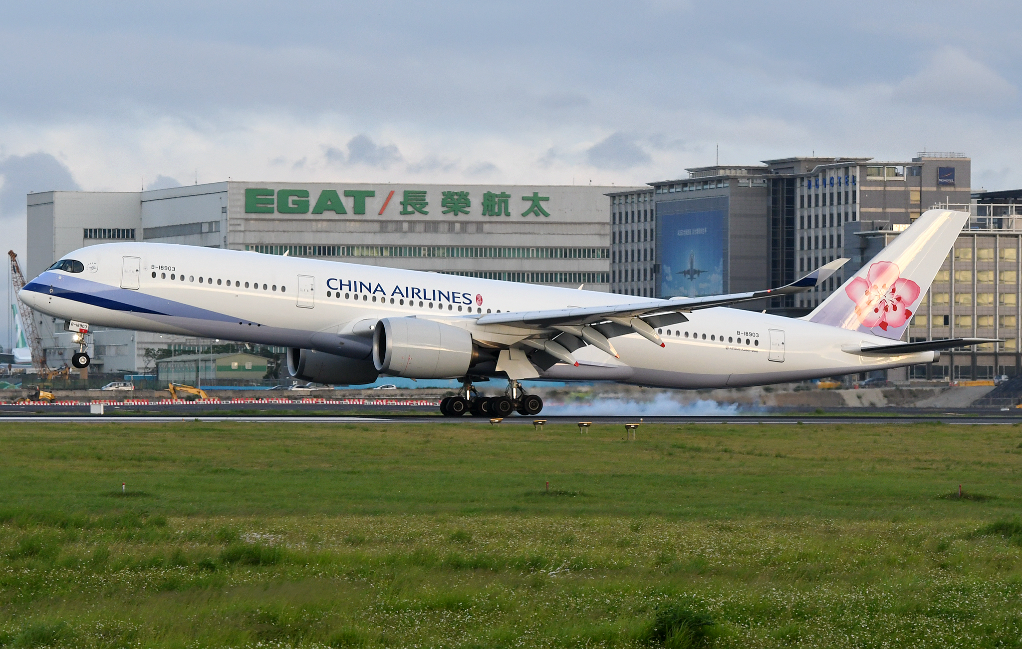 B-18903